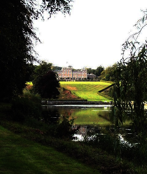 Mellerstain Lake